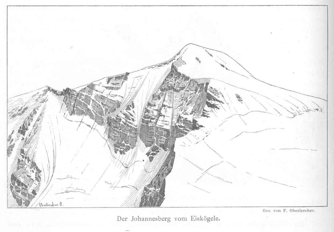 Johannisberg (Hohe Tauern)